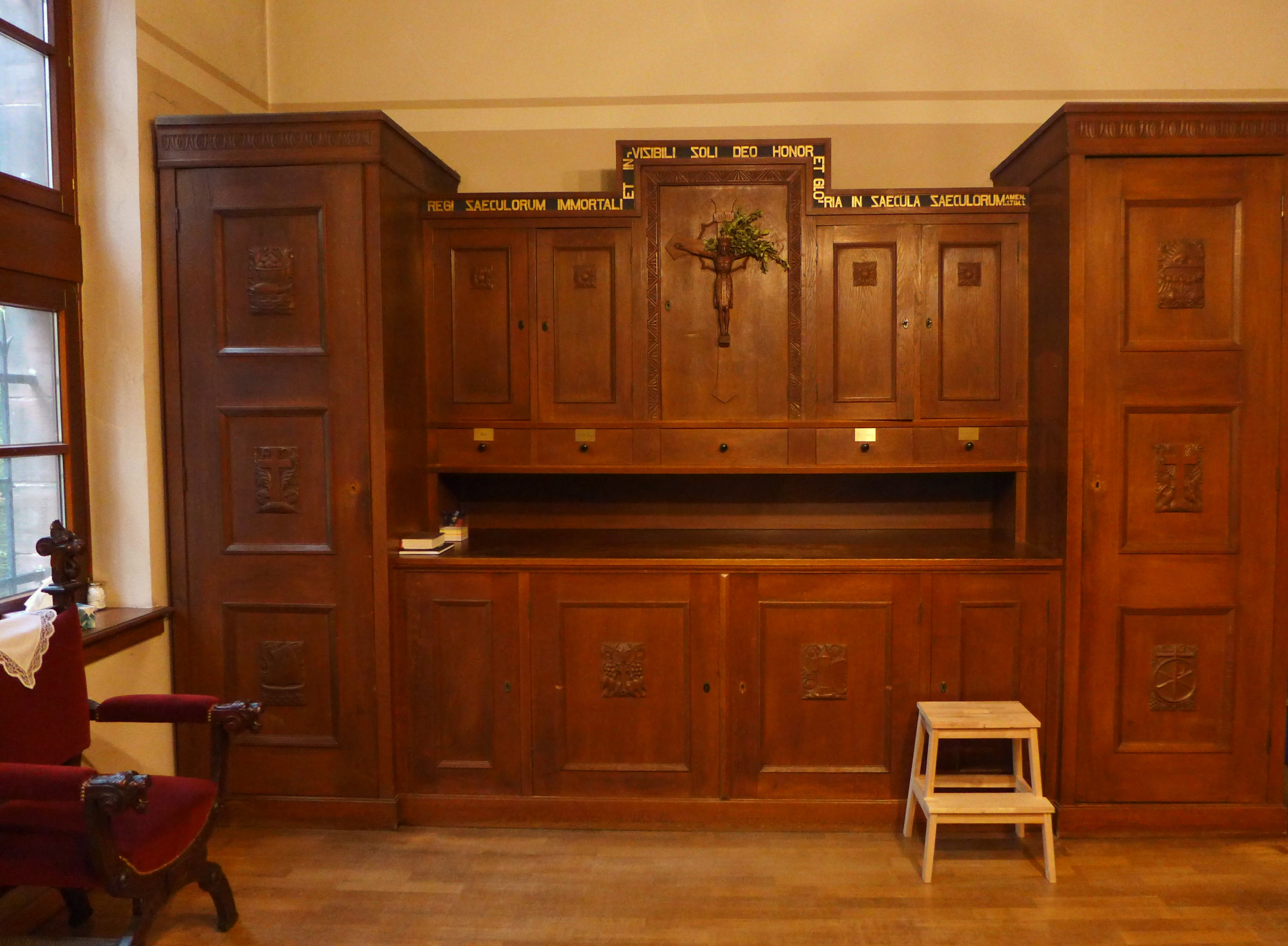 Christkönig-Kirche (Saarbrücken),Sakristei